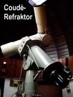 Das Coudé-Teleskop (Refraktor) der Sternwarte Heilbronn (Carl Zeiss Jena, 1983)